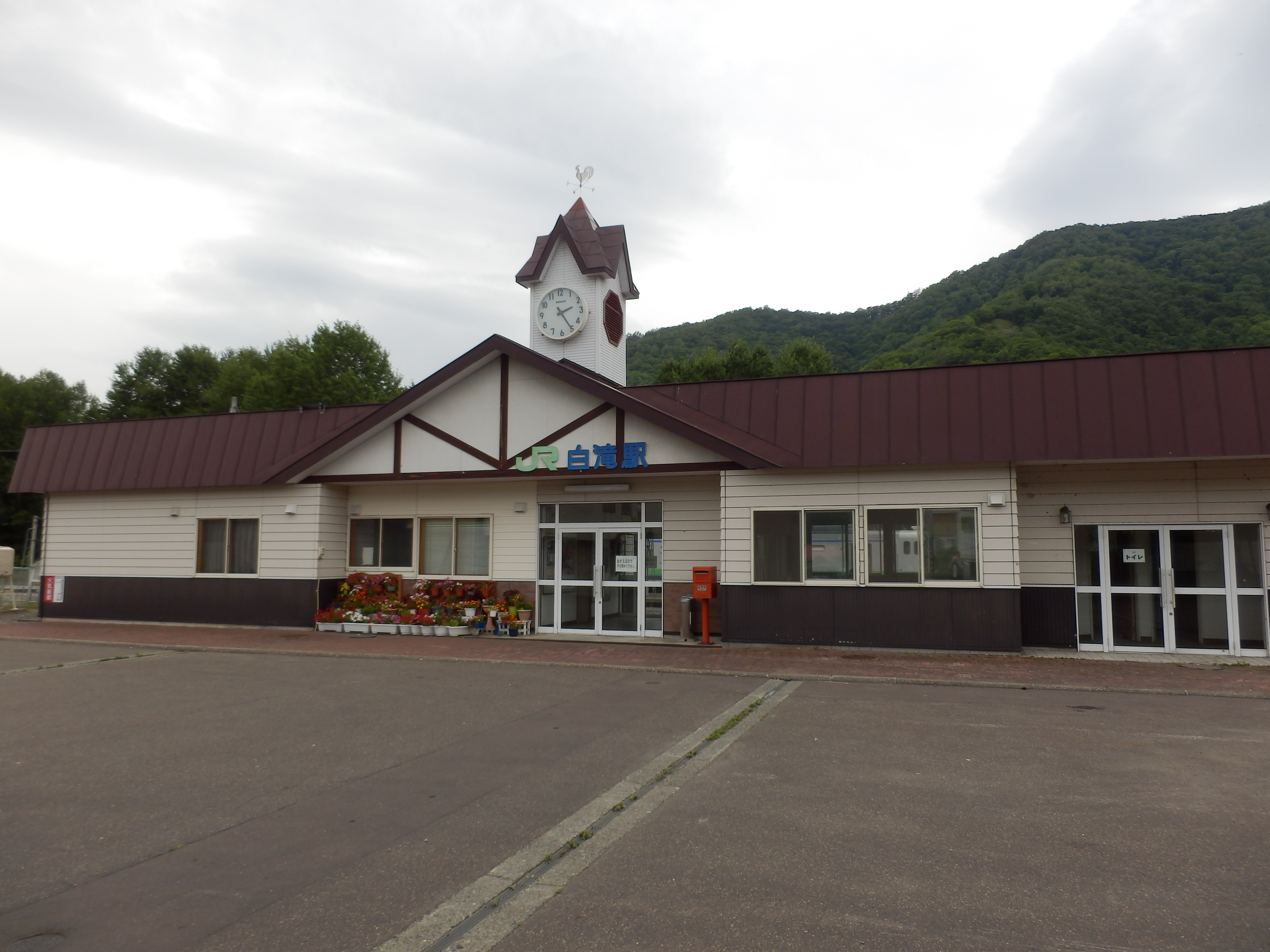 白滝駅舎全景（2013年8月）